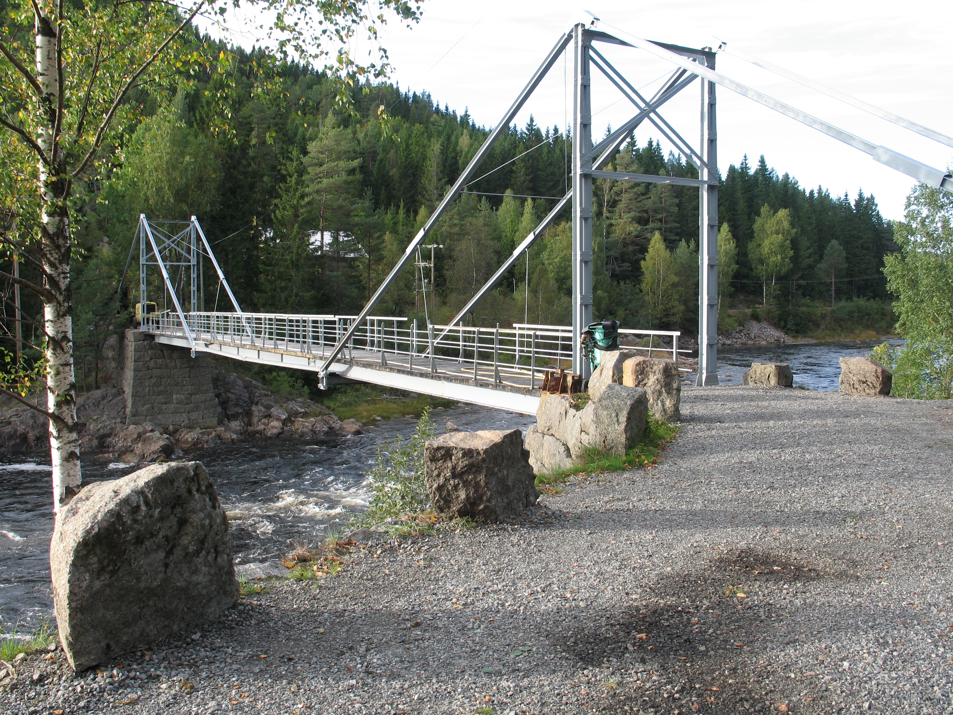 Slettene bru i Birkenes i Aust-Agder